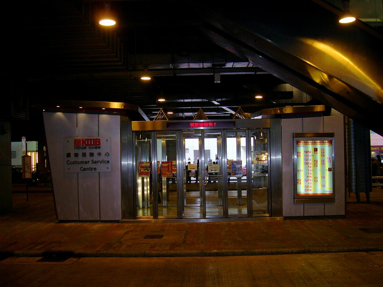 九龍巴士位於新城市廣場巴士總站的顧客服務中心